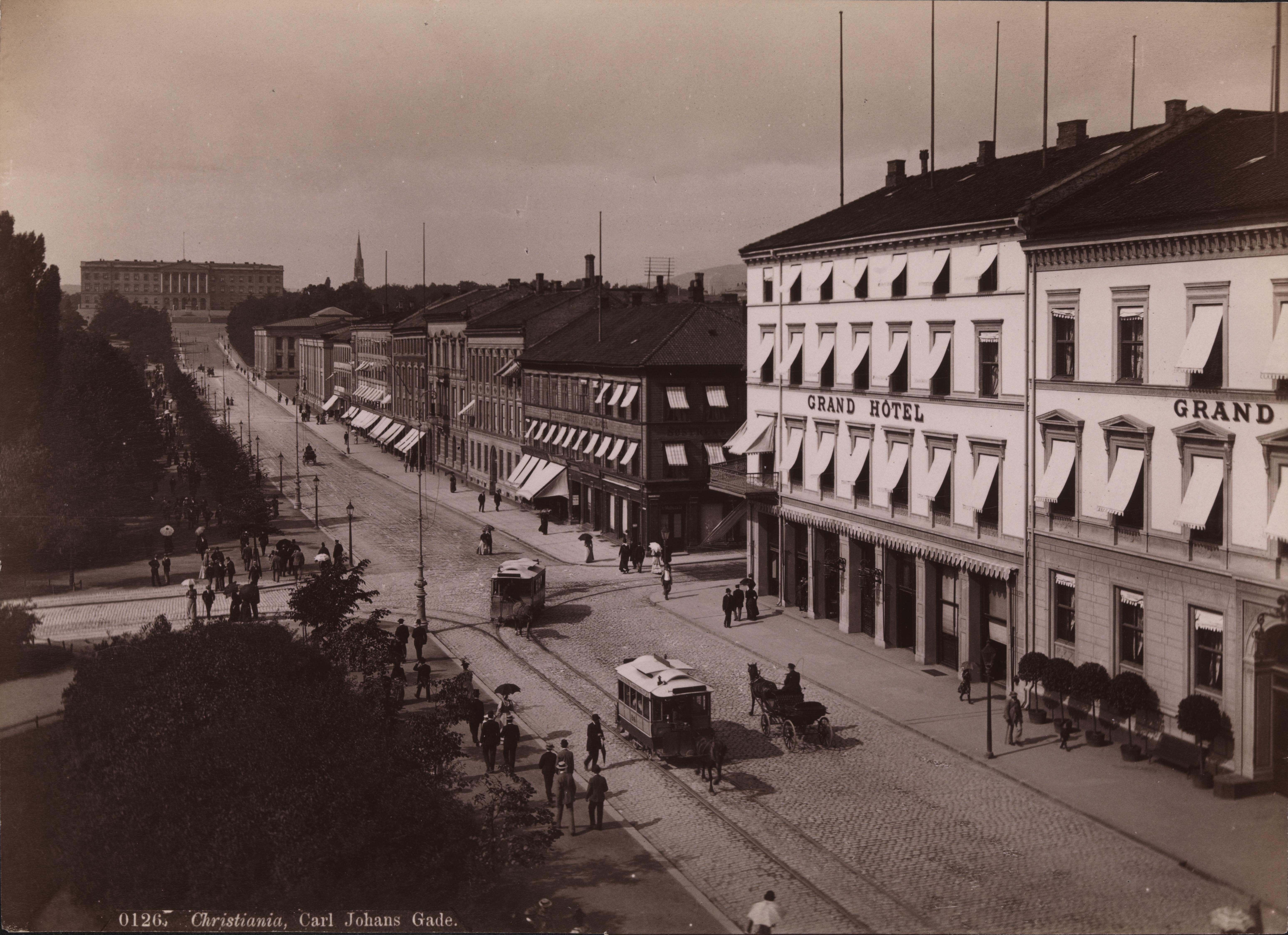 Sted: Det kongelige slott Kommune: Oslo Fylke: Oslo Tagger: eksteriør fasader hestekjøretøy hester hoteller trikker bylandskap